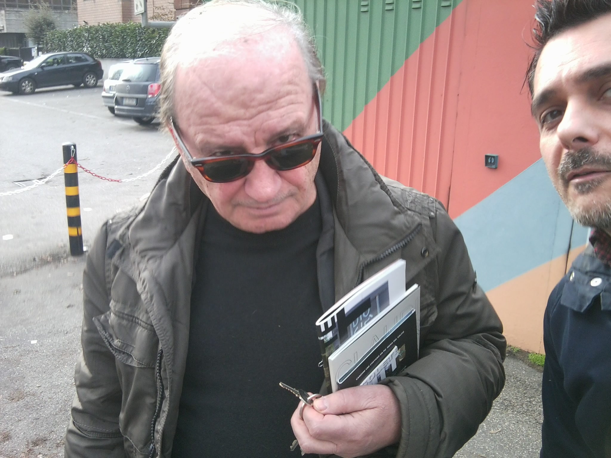 Franco Vaccari fotografato il 6 gennaio 2013, sulla destra Stefano W. Pasquini